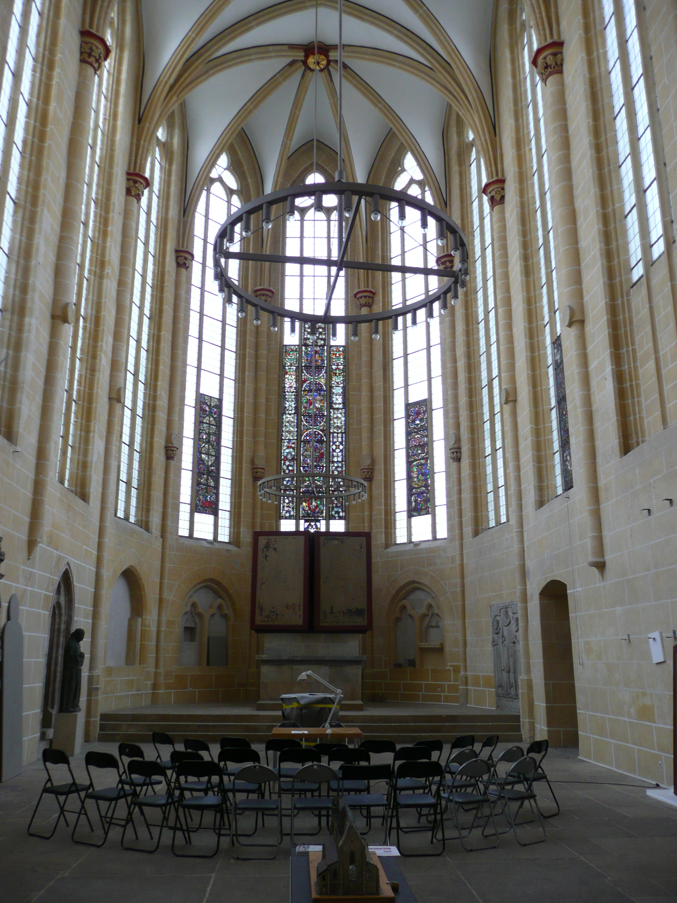 Erfurt, Barfüßerkirche, Chorraum, Blick auf die Chorapsis. Zustand der Restaurationsarbeiten im September 2013